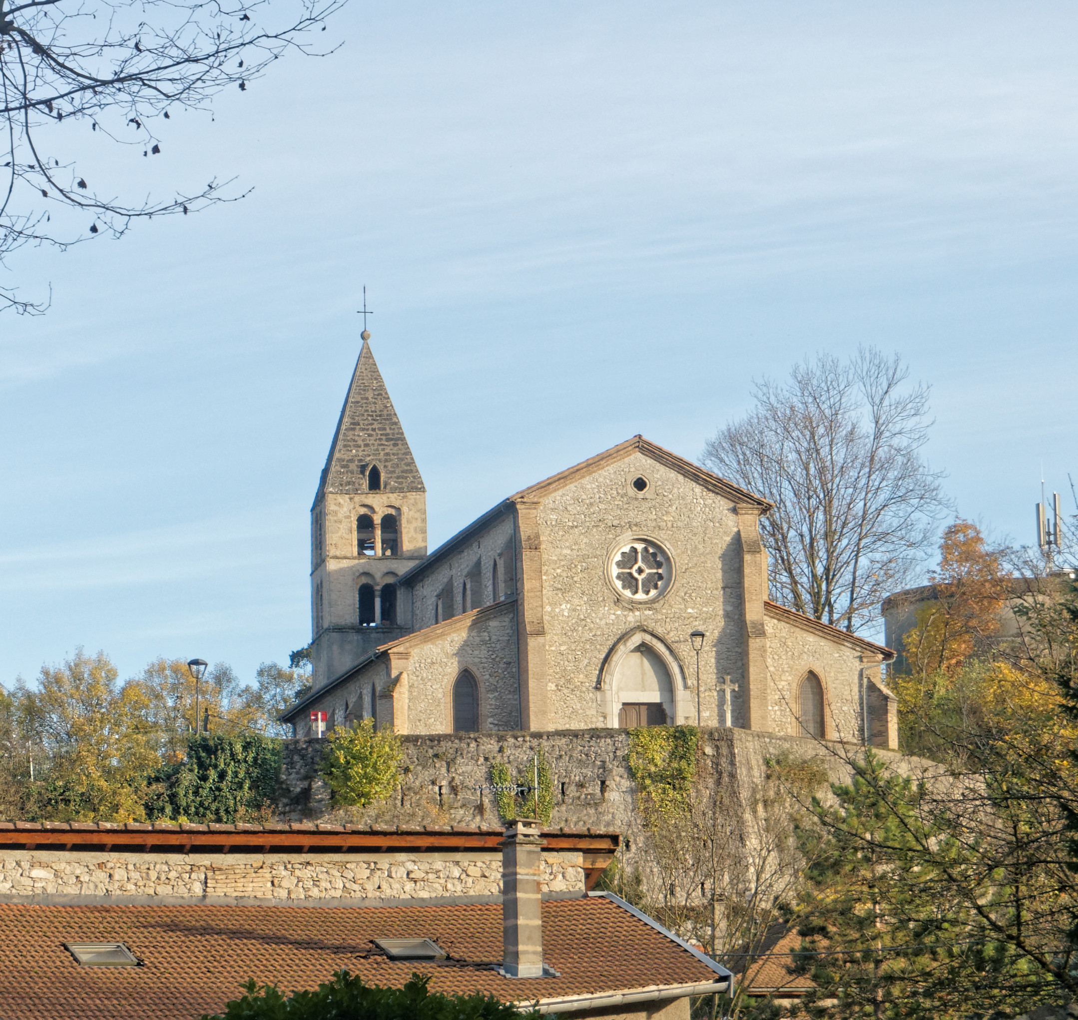 Eglise de Varces